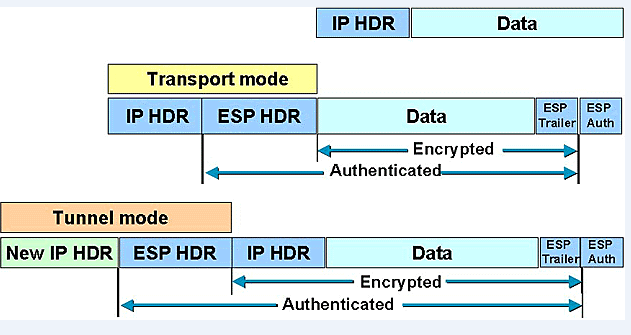 Монгол: skdk